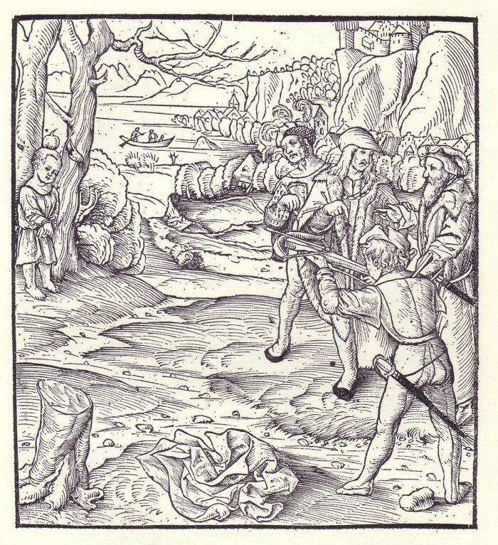 Tells Apfelschuss, Holzschnitt von Hans Rudolf Manuel Deutsch in der Cosmographia des Sebastian Münster (1554). [1] vgl. Ausgabe von 1545.